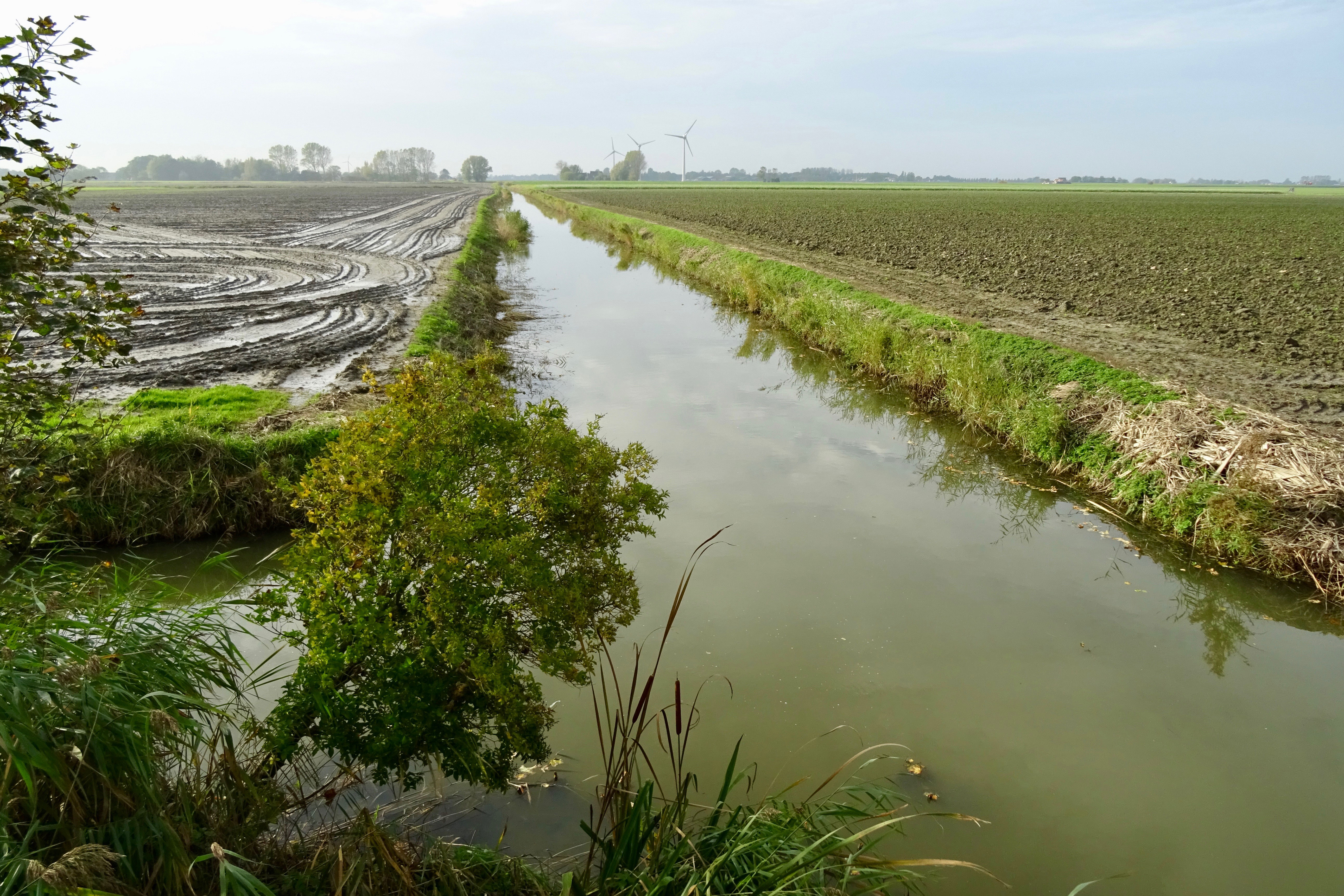 De Hijumer Feart bij de Mariëngaarderweg